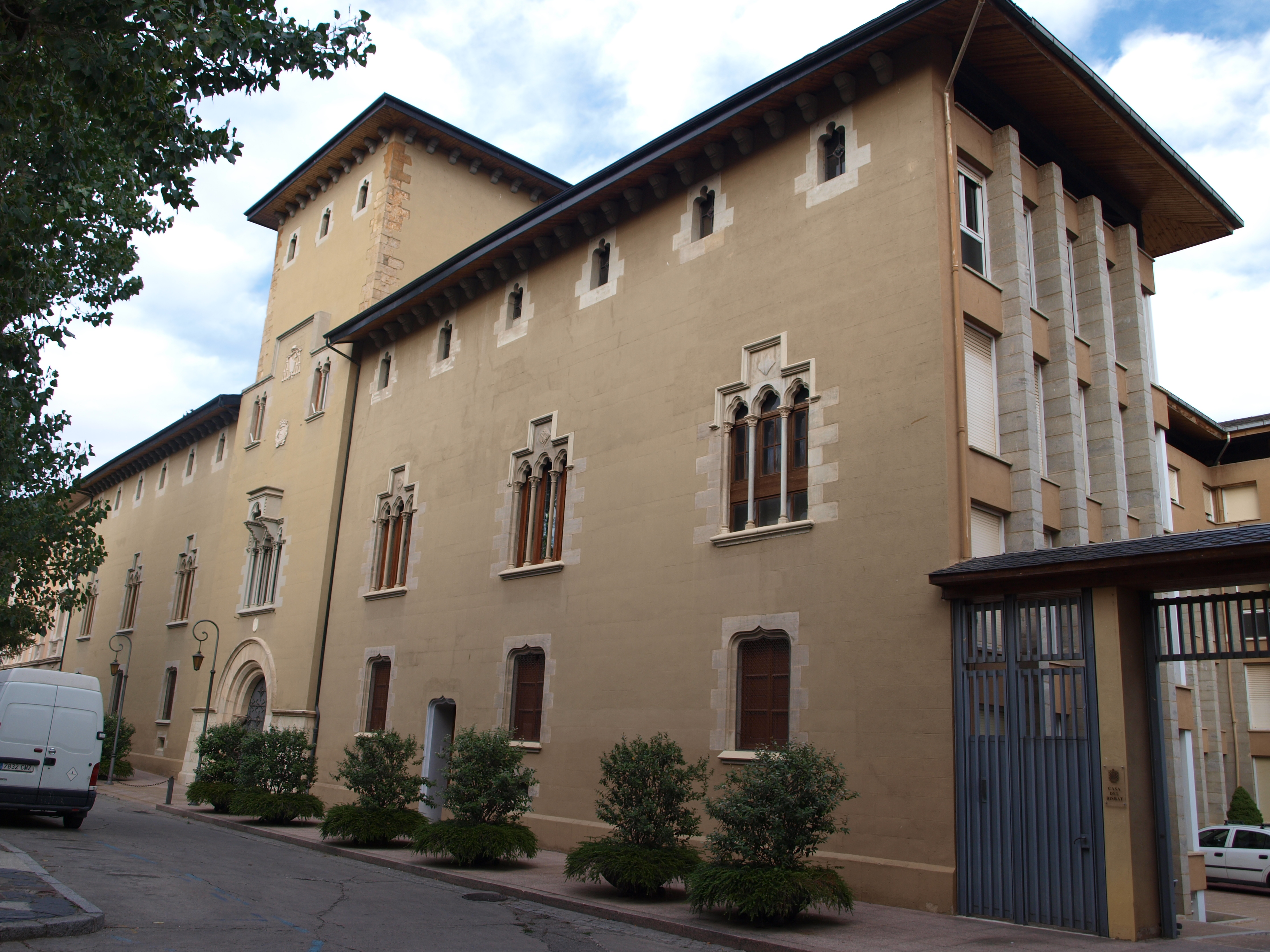 Palau Episcopal (la Seu d'Urgell)